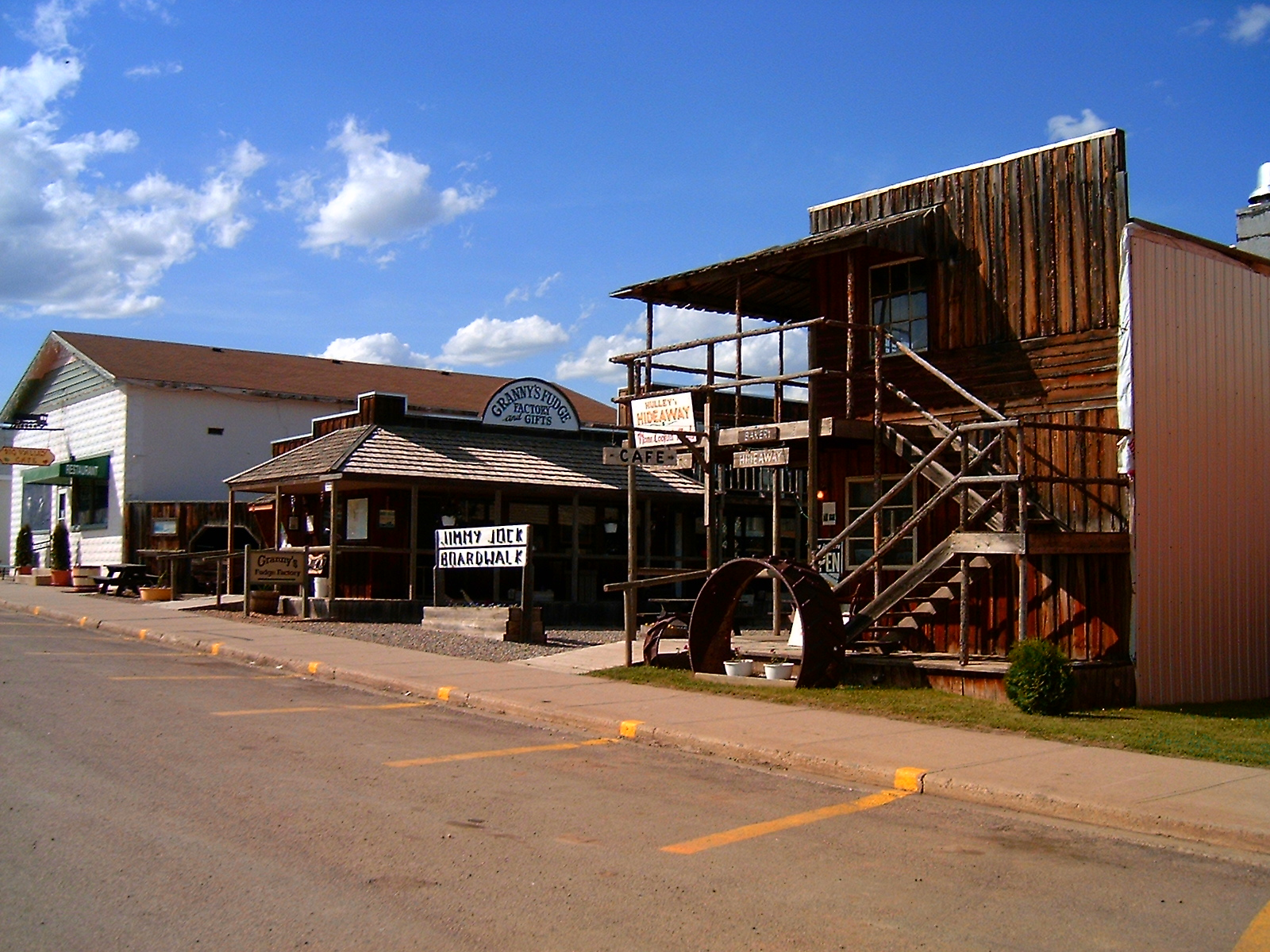 Jimmie Jock Boardwalk in Big Valley, Alberta